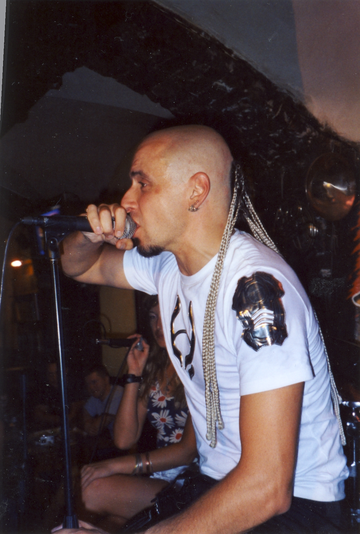 Kirill Nemoljajew bei dem Konzert von "Boney NEM" im Klub "Schwein" (Moskau, 28.07.07)